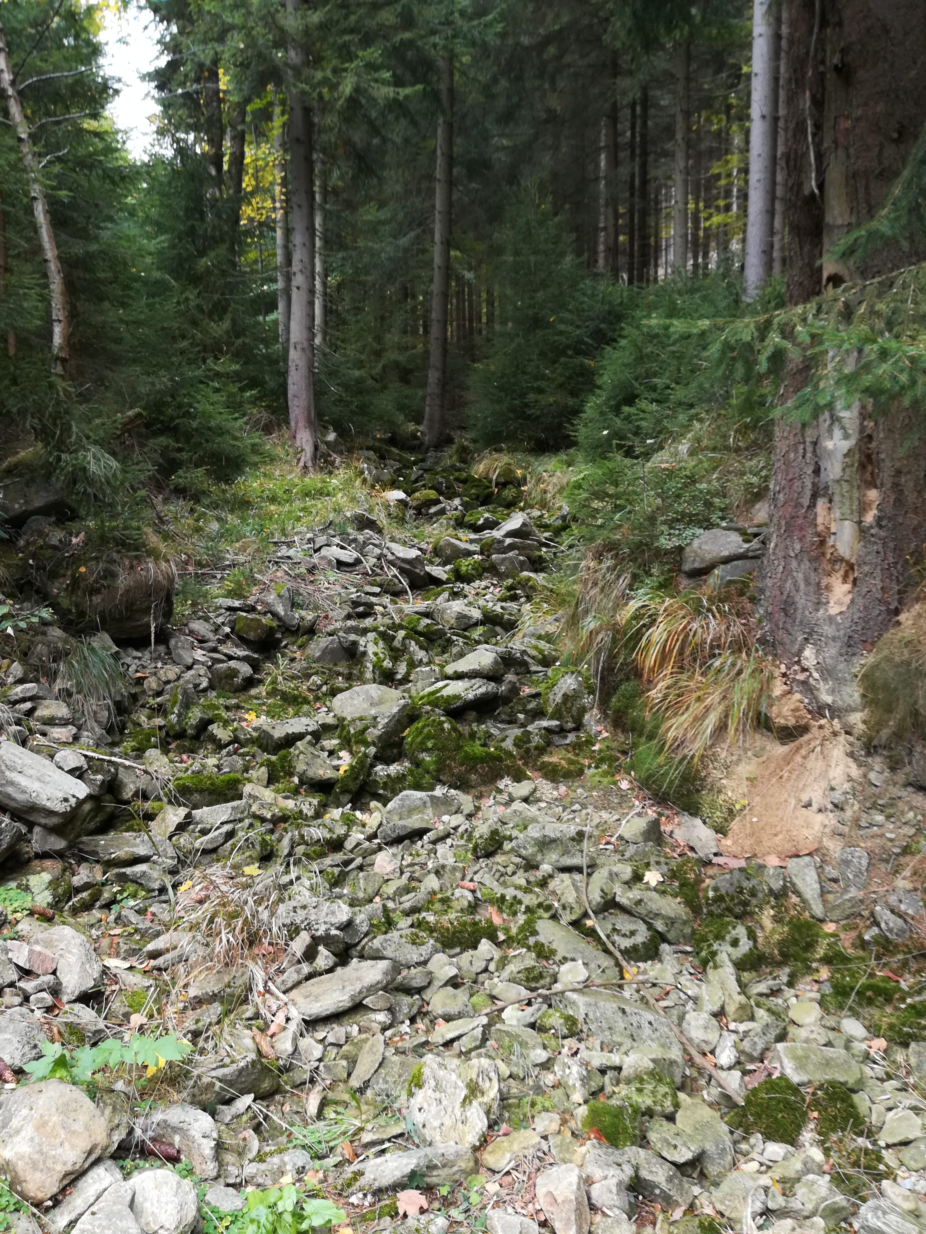 vyschlé koryto potoka Poniklec, Horní Morava